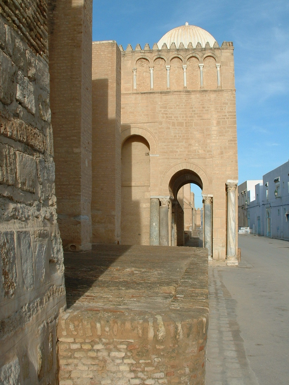 Photographie personnelle (Asram) de la mosquée de Kairouan (Tunisie); vue du mur extérieur côté est.